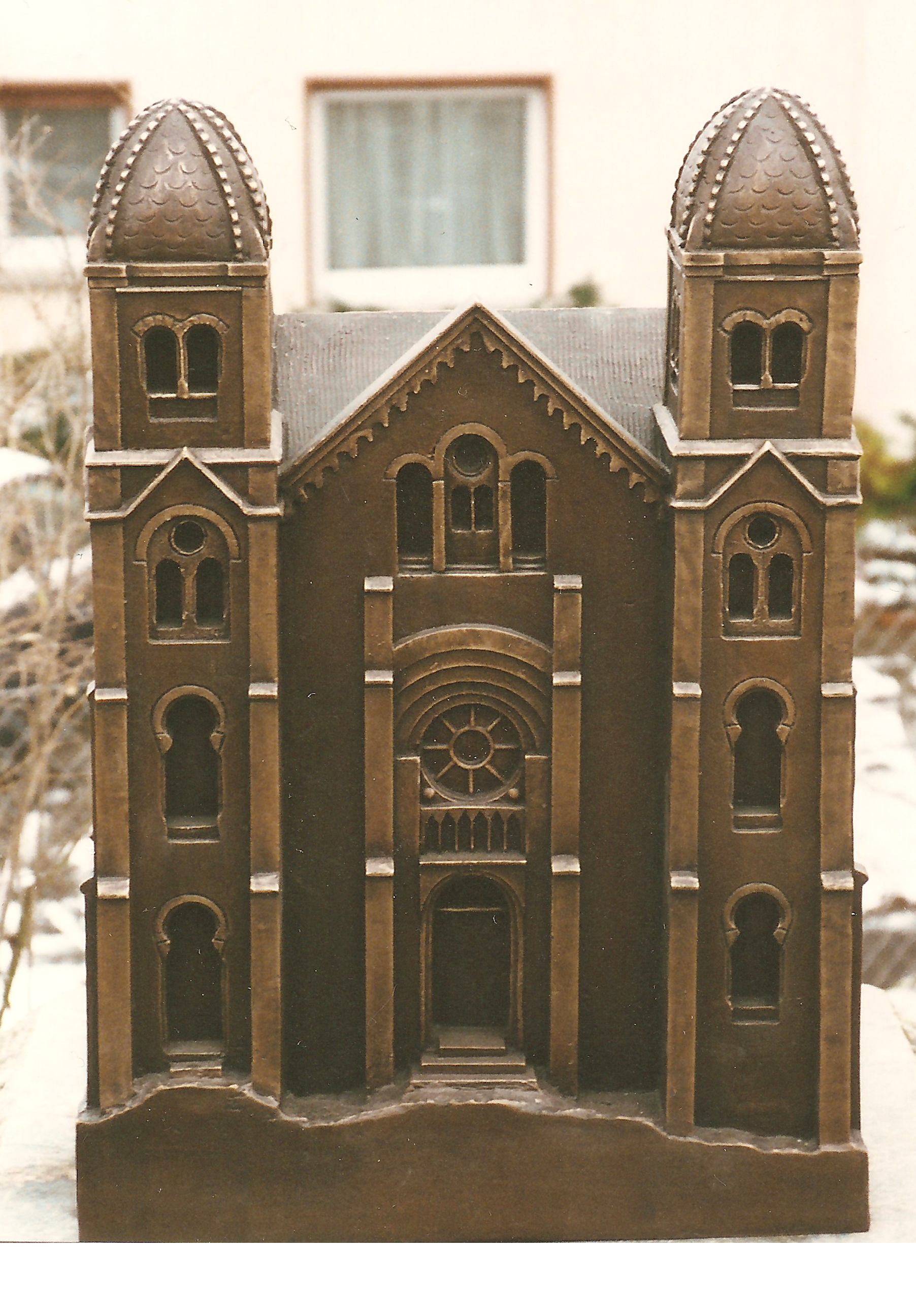 Fotografie des Synagogendenkmals Königstein im Taunus, das die Form eines in Bronze gegossenen Modells der ehemaligen Synagoge hat. Ansicht des Portals auf der Nordseite. Fotografiert im Jahr 1996 von der Bildhauerin, die in Zusammenarbeit mit der Gesellschaft für Christlich-Jüdische-Zusammenarbeit Hochtaunus (Vorsitzende Ingeborg Klein), das Modell schuf.